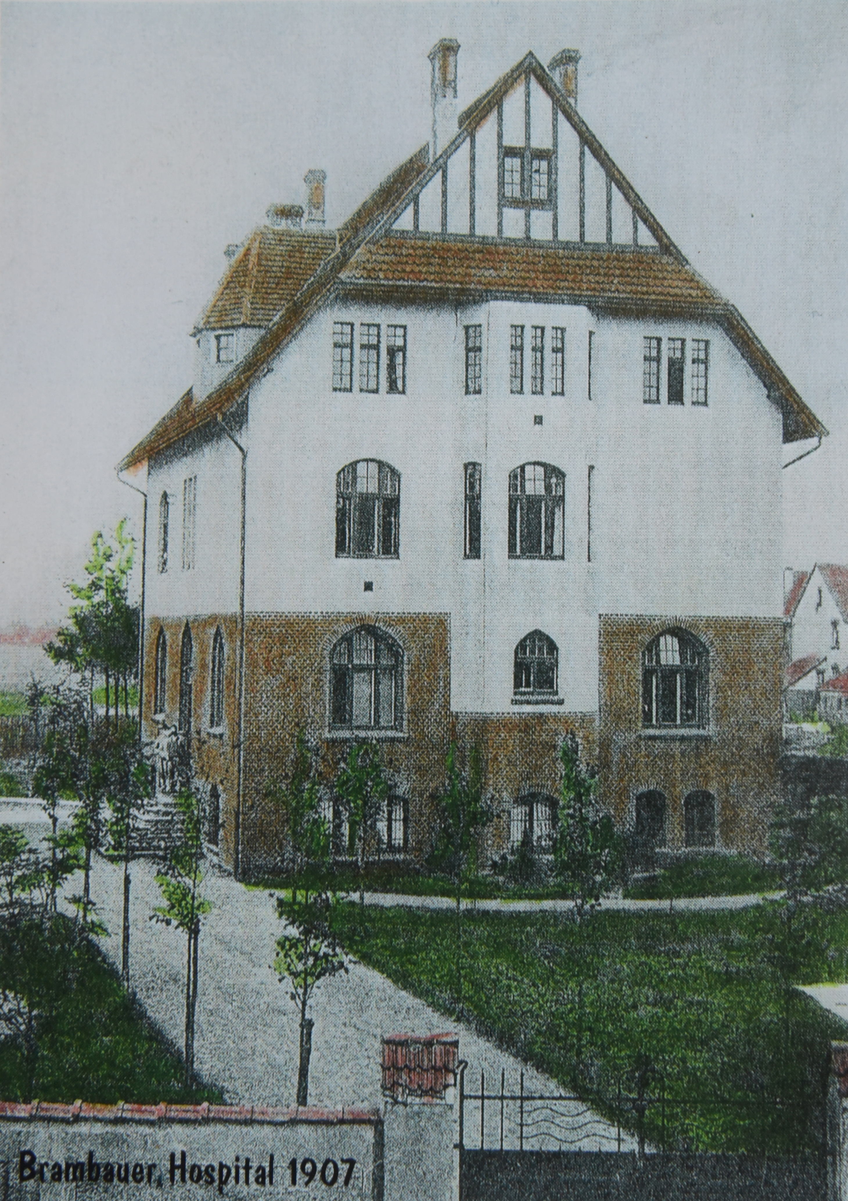 Historisches Foto der Klinik am Park Lünen aus 1907